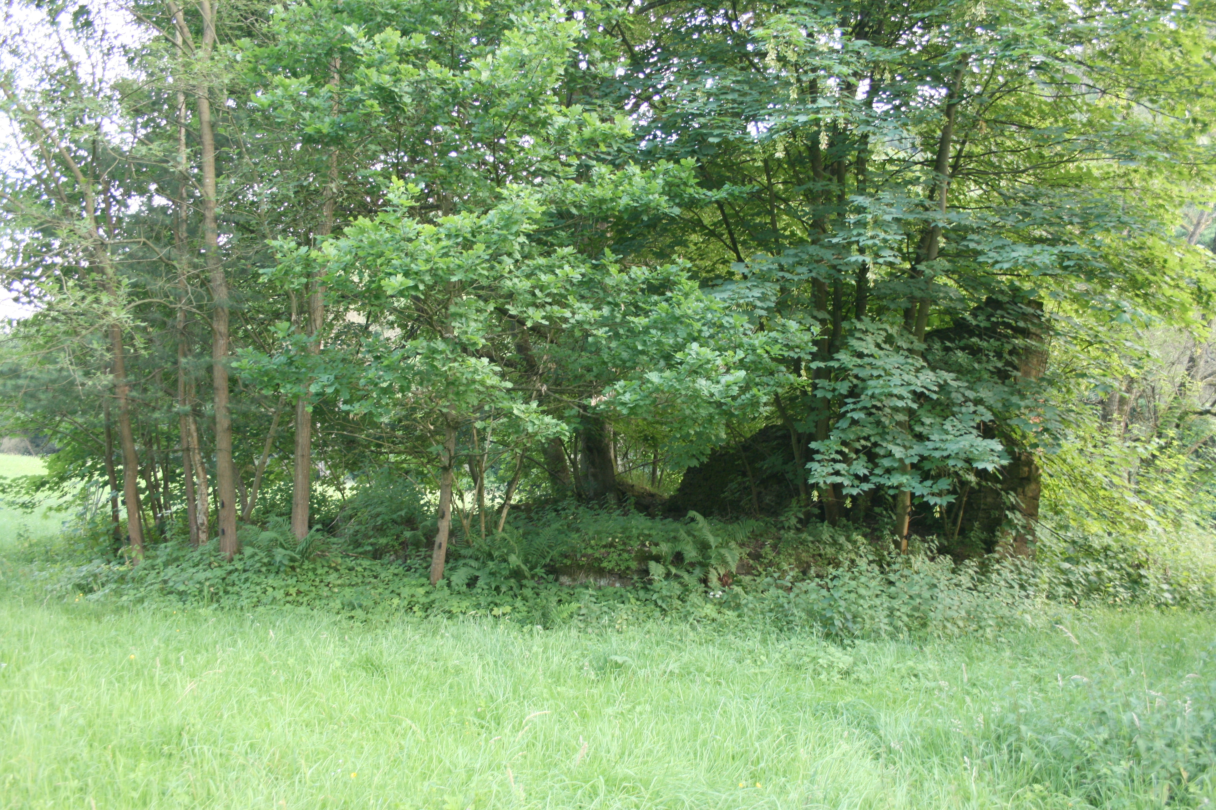 Mühlhäuser Schlößchen bei Breuberg, Odenwald, Hessen. Ansicht des Gebäudes, Nordostseite.